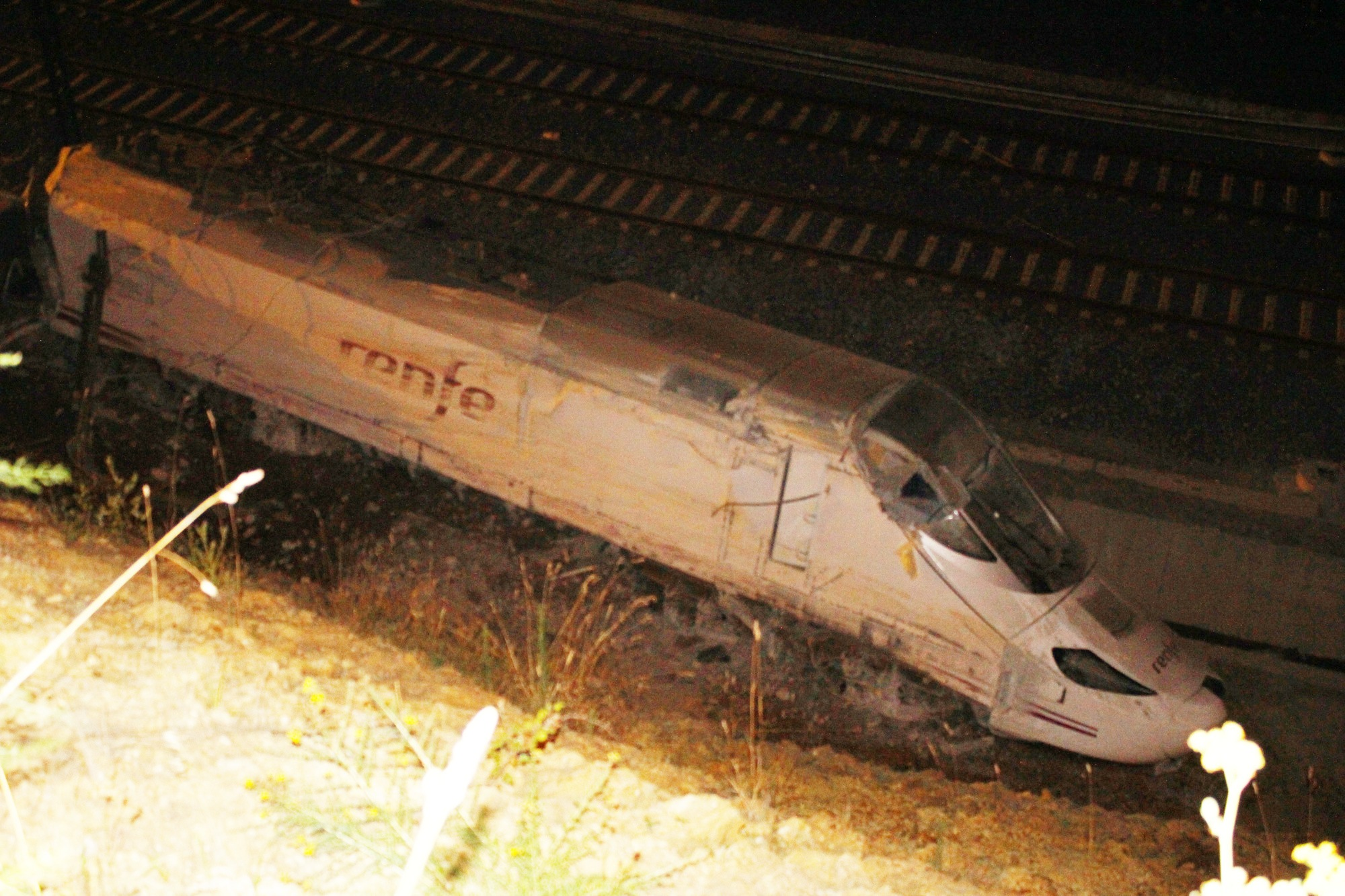 Fotos que hice in situ del accidente ferroviario ocurrido este 24 de julio cerca de Santiago de Compostela. En el momento de escribir estas líneas ya se cuentan 65 muertos. Es el peor accidente ferroviario de España en los últimos 40 años. Tragedy in Santiago de Compostela Photos I made on-site of the train crash on July 24 near Santiago de Compostela. At the time of writing are counted 65 dead. It is the worst rail accident in Spain in the last 40 years.